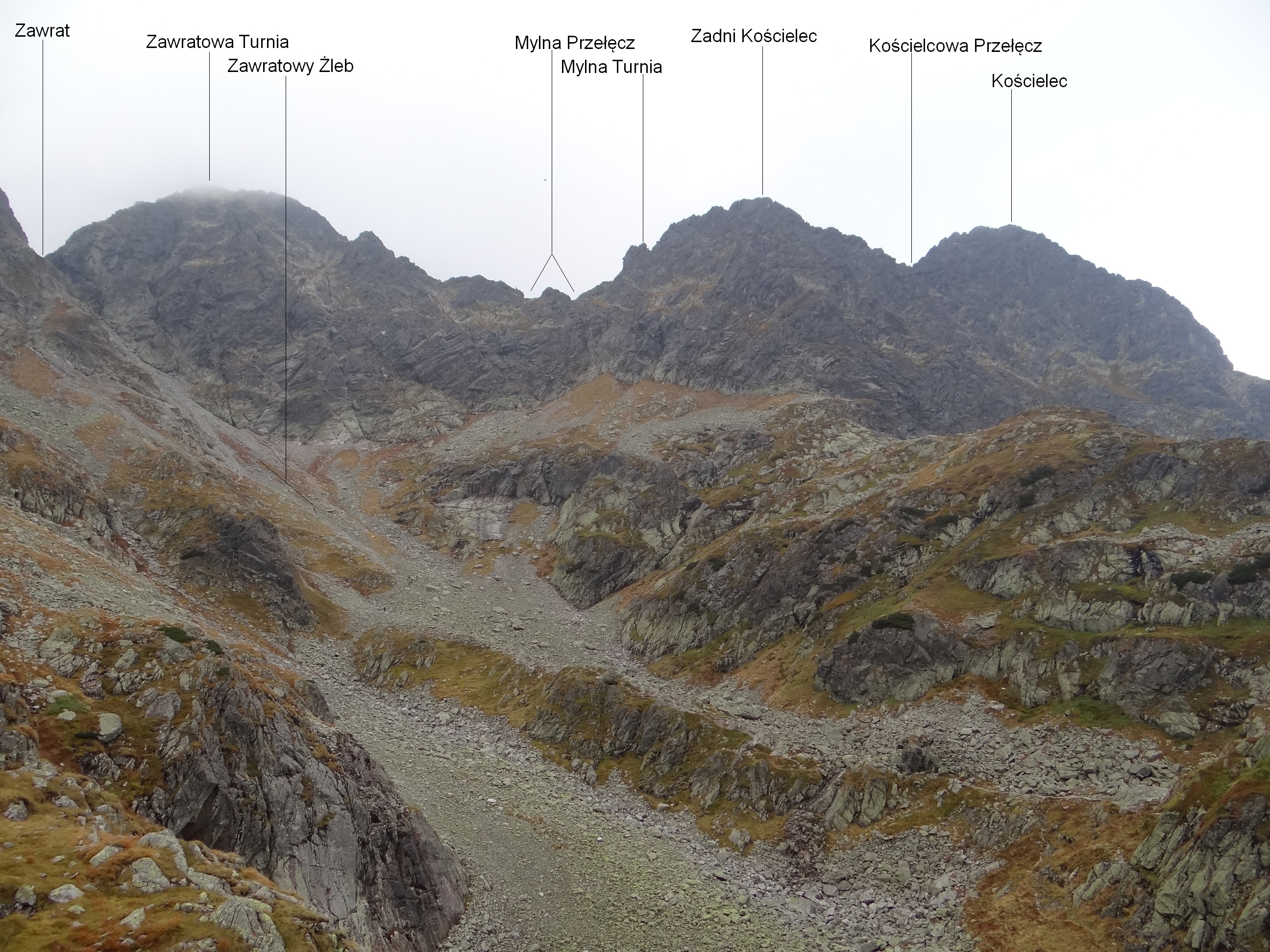 Zawratowy Żleb